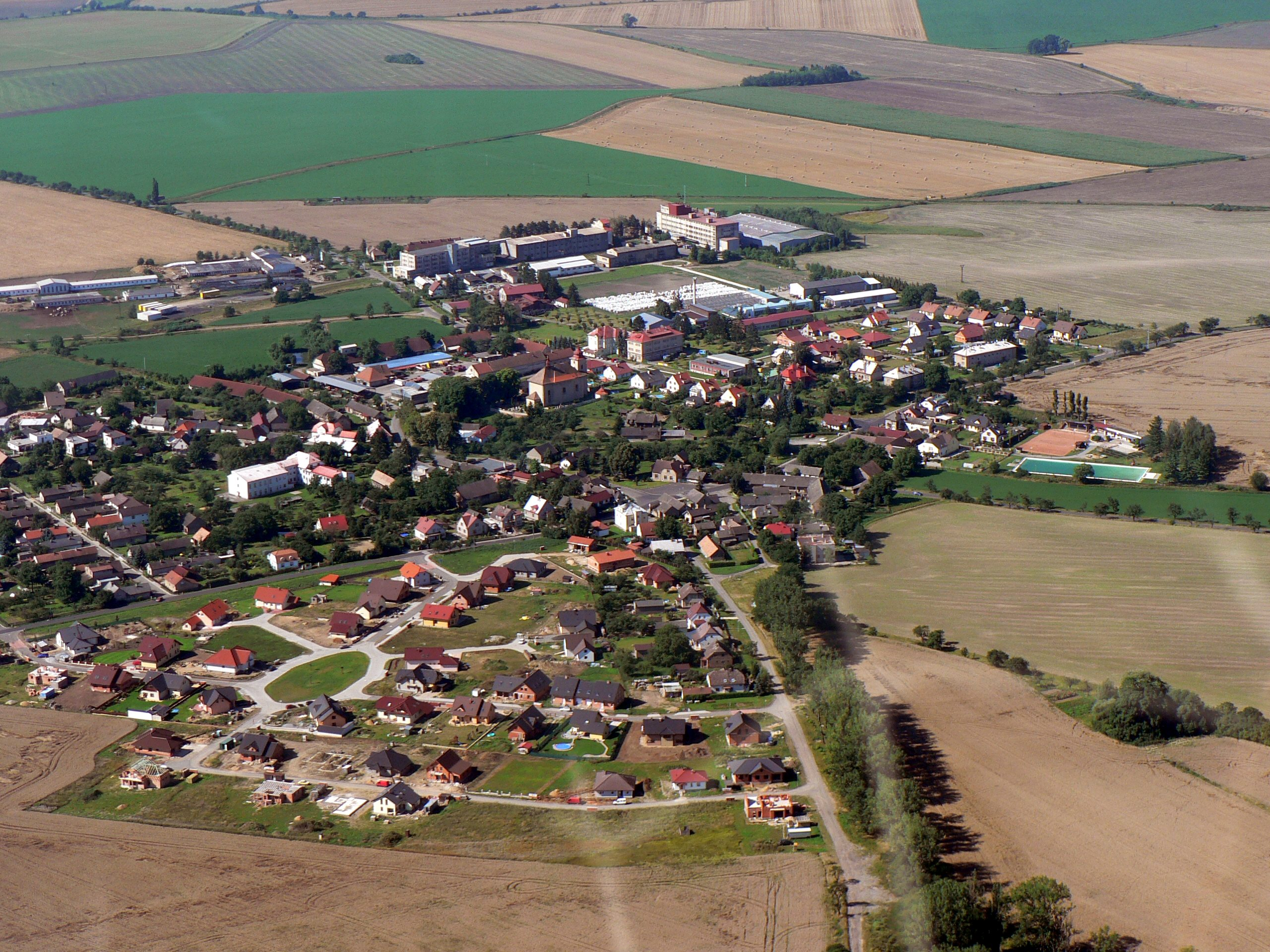 Letecký pohled na Semčice ze severu